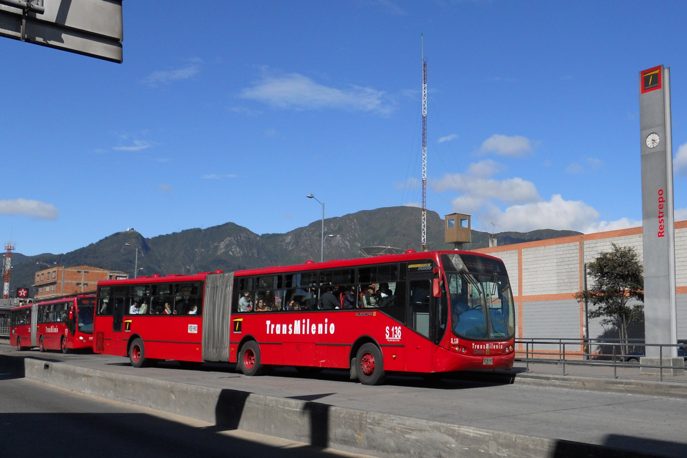 Buses de Transmilenio en la estación Restrepo.